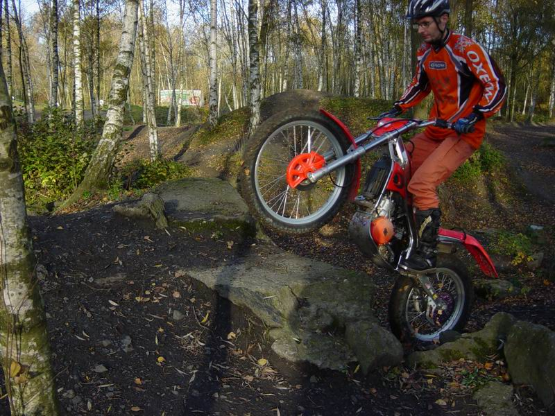 franchissement d'une "marche"